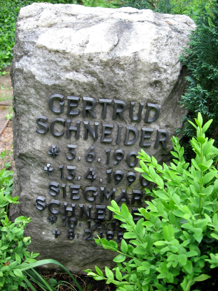 Siegmar Schneiders Grabstein auf dem Friedhof Stuttgart-Sillenbuch